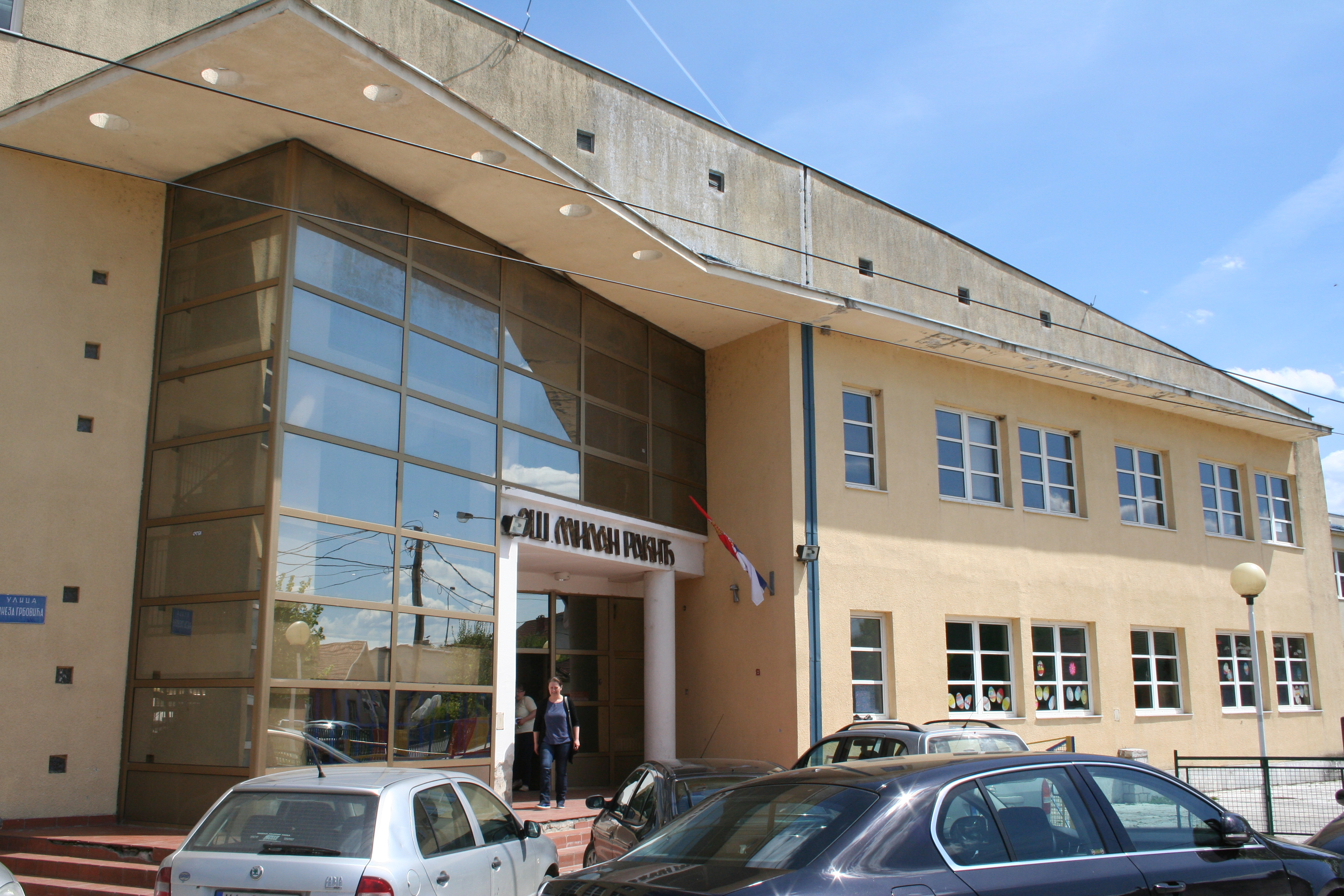 Mionica i spomenici u njoj